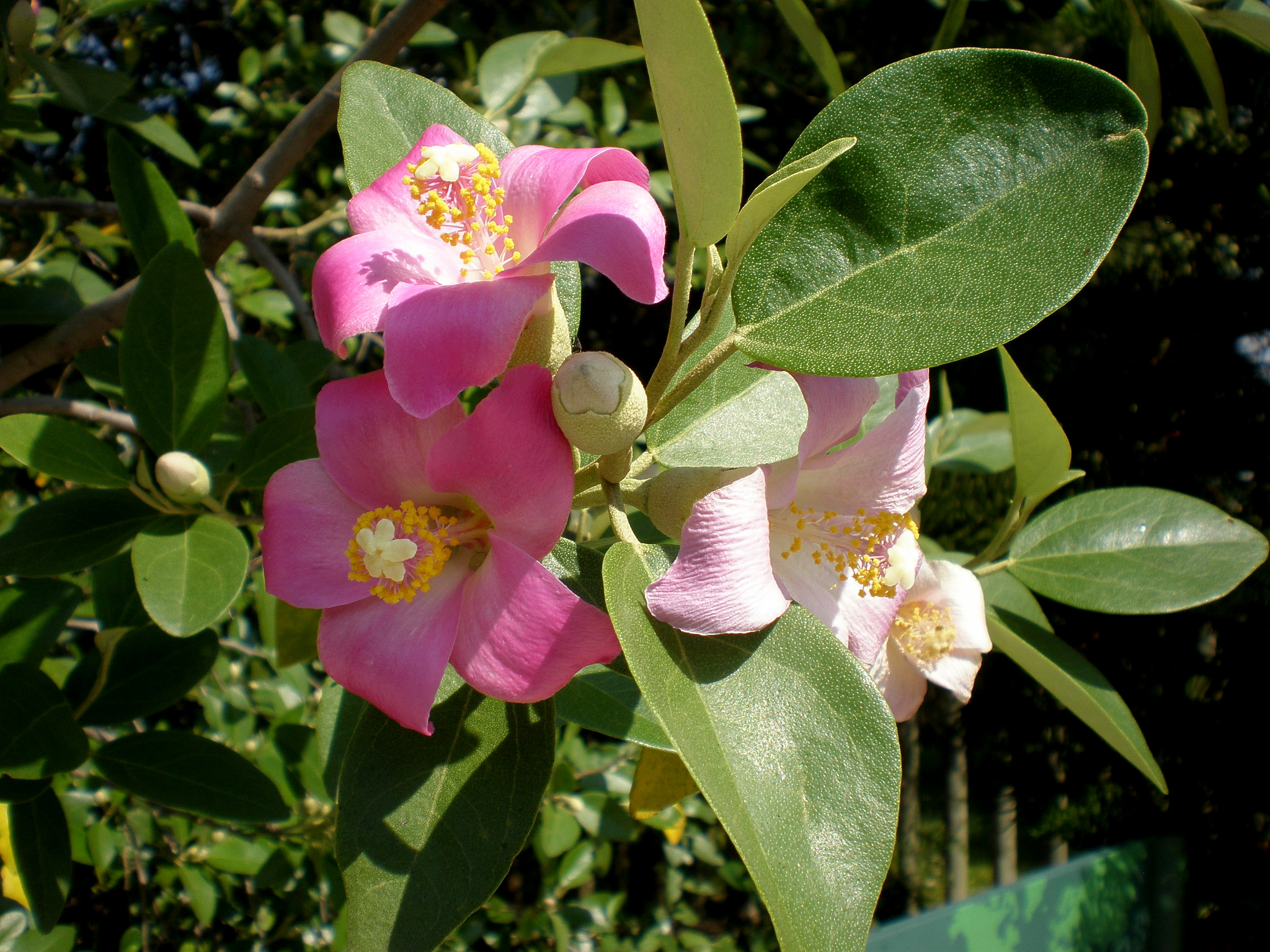 Jardín Botánico de Barcelona.